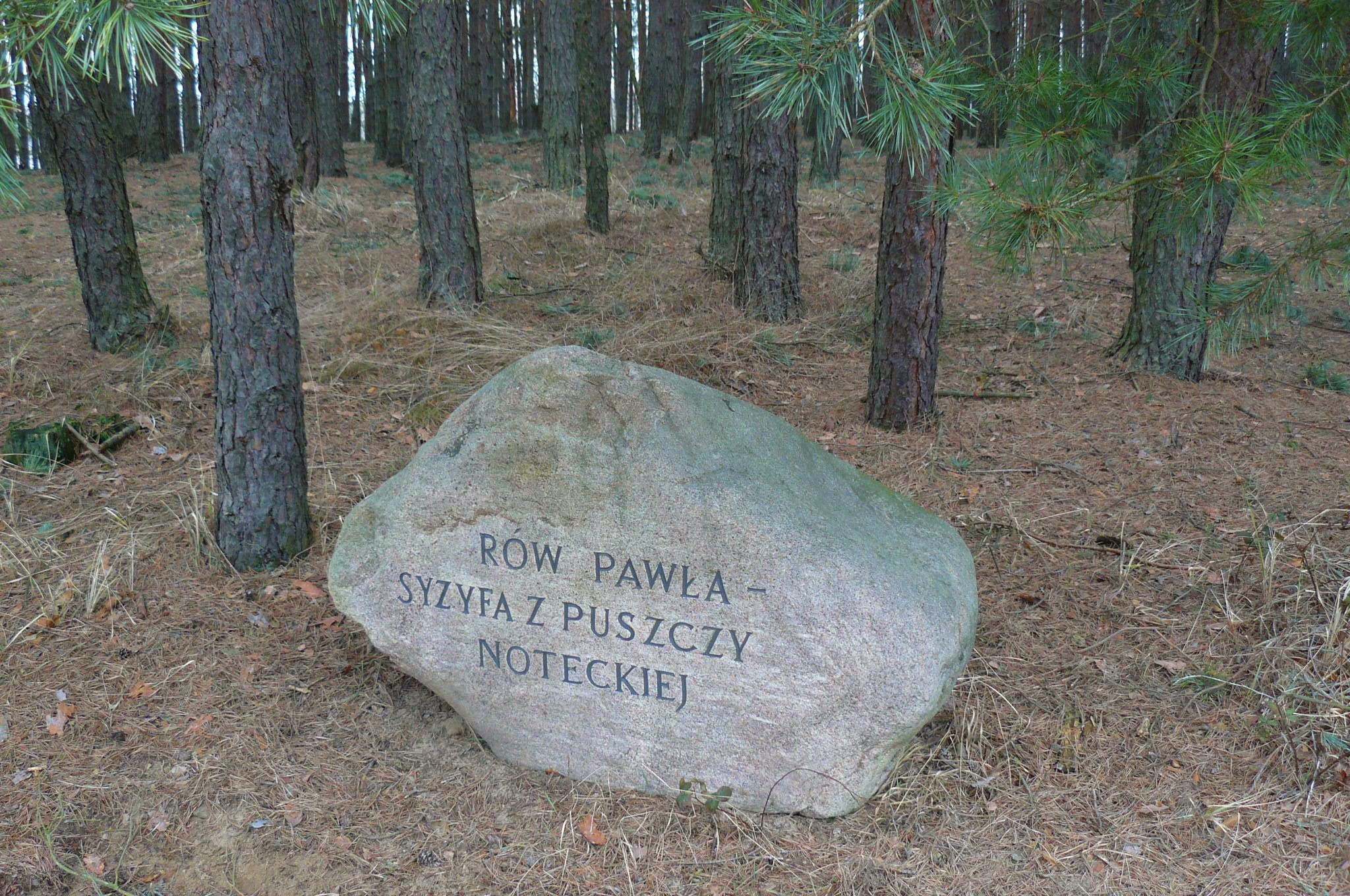 Tzw. Rów Syzyfa w Mężyku - Puszcza Notecka. Wykopany ręcznie przez Pawła Jechalika. Ukończony w 1999.